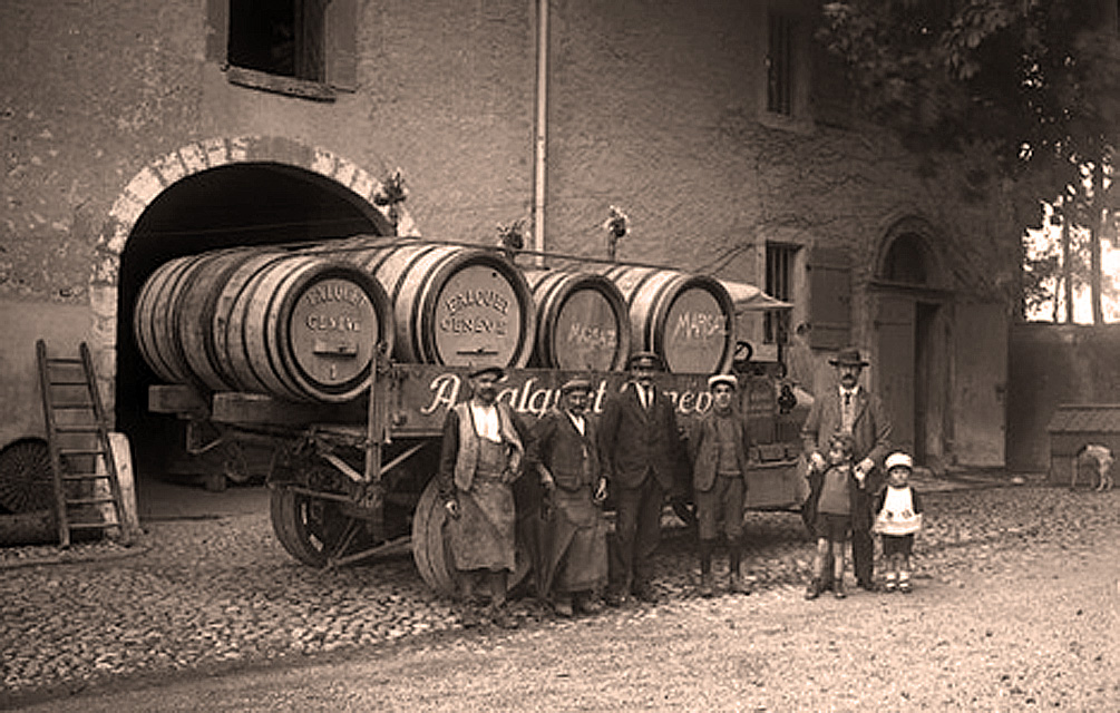 Employés de la Maison Falquet de Genève prenant livraison du vinifié dans un domaine de Ville-la-Grand (Haute-Savoie / France) pour la vente à Genève